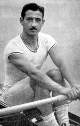 Martin Stahnke olimpijczyk z RV Wratislavia Breslau